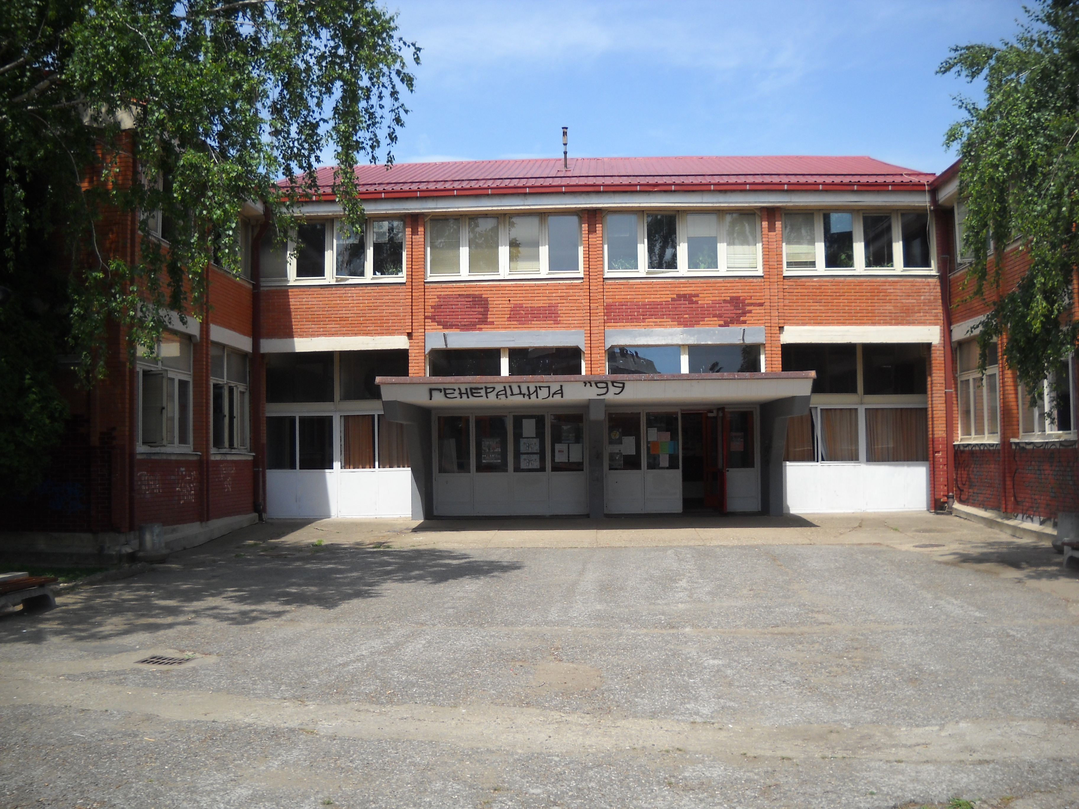 Основна школа Свети Сава Ниш